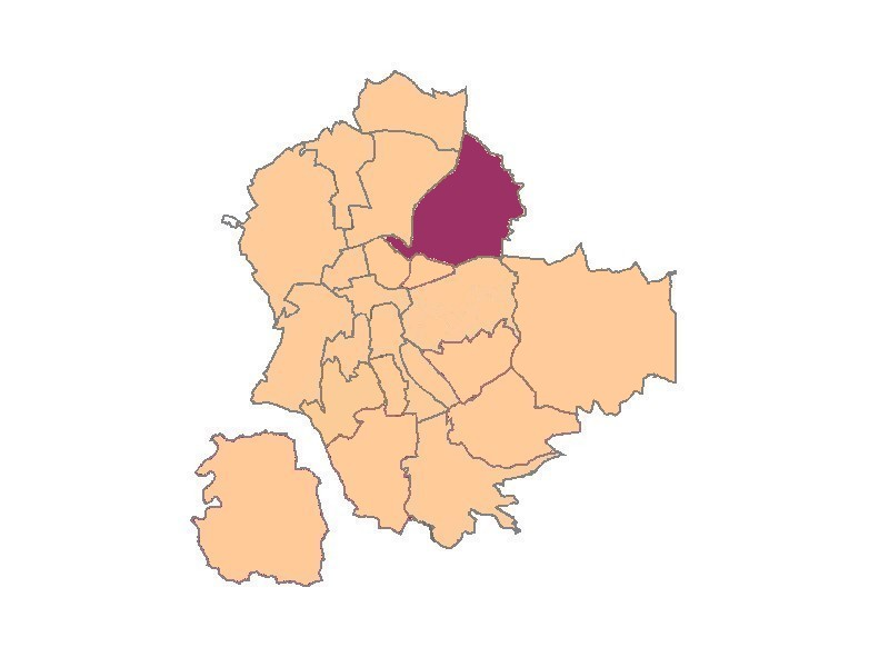 plan de saint-etienne quartier de Méons Le Soleil